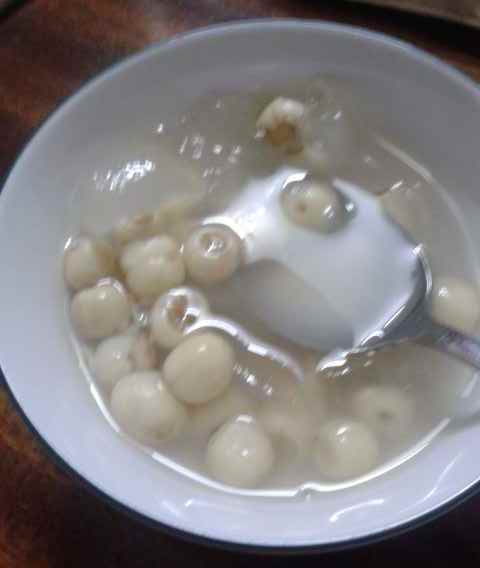 Cuisine of Vietnam